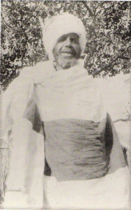 דבתרא ברוך אדהנן (1850 - 1936) היה מגדולי כהני ביתא ישראל